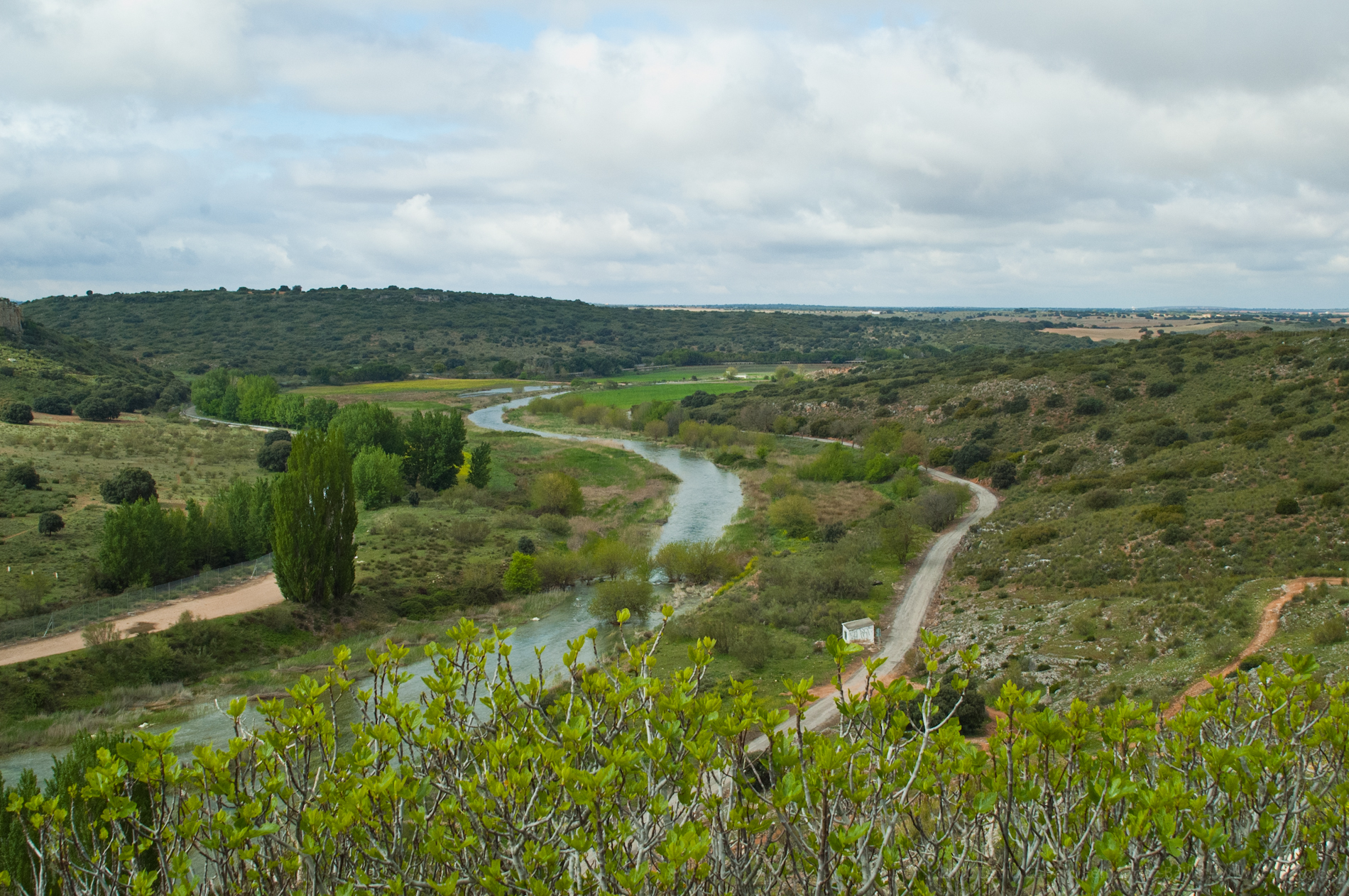 Vista desde embalse en castillo de Peñaroya This is a photography of a Site of Community Importance in Spain with the ID: ES4210017. Natura2000 entry, EEA entry